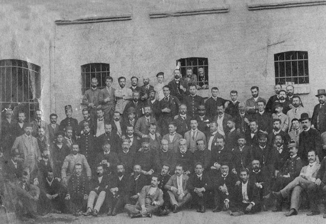 Balmacedistas fotografiados mientras estaban presos en la cárcel de Valparaíso en 1891